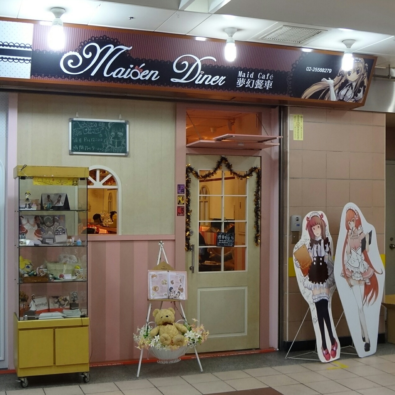 夢幻餐車女僕喫茶，位於台北地下街美食區11室。